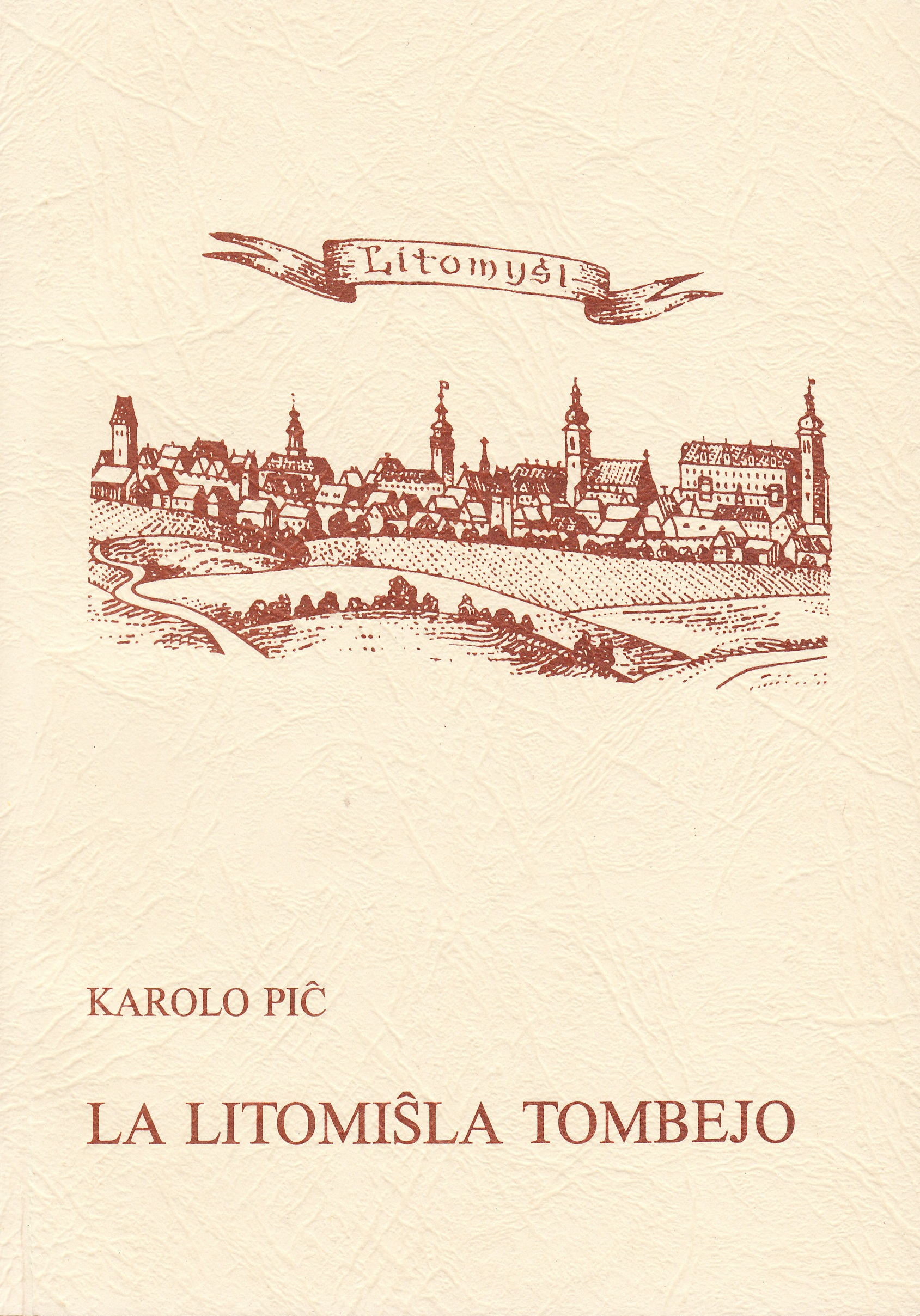 Litomisxla Tombejo